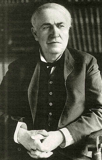 Copia editada da imagem original (Thomas_Edison.jpg) carregada no commons.